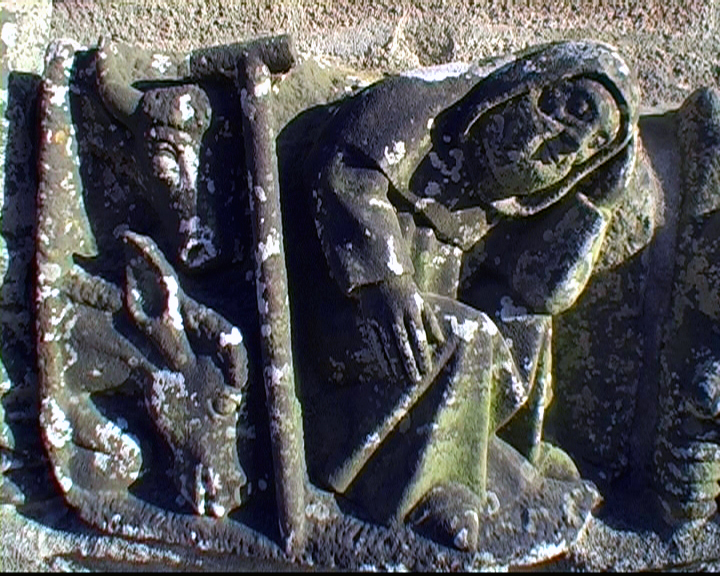 Saint-Jean-Trolimon (Bretagne, Finistère) Calvaire bei der Kapelle Notre-Dame-de-Tronoën, Nordseite, Detail: (unten) Geburt Christi, Detail: Josef, eingeschlafen, gemäß dem Bericht der apokryphen Evangelien.